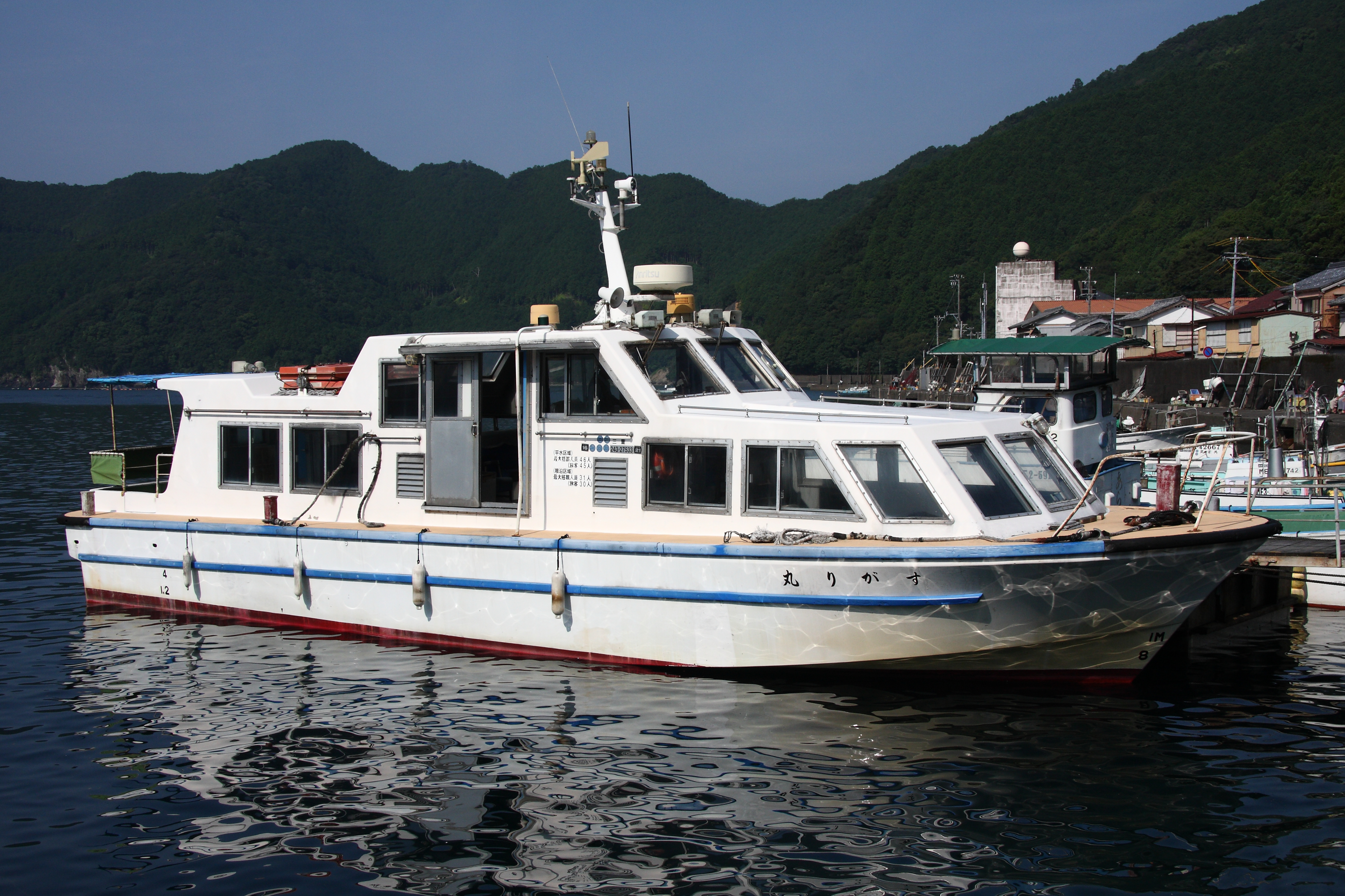 須賀利側